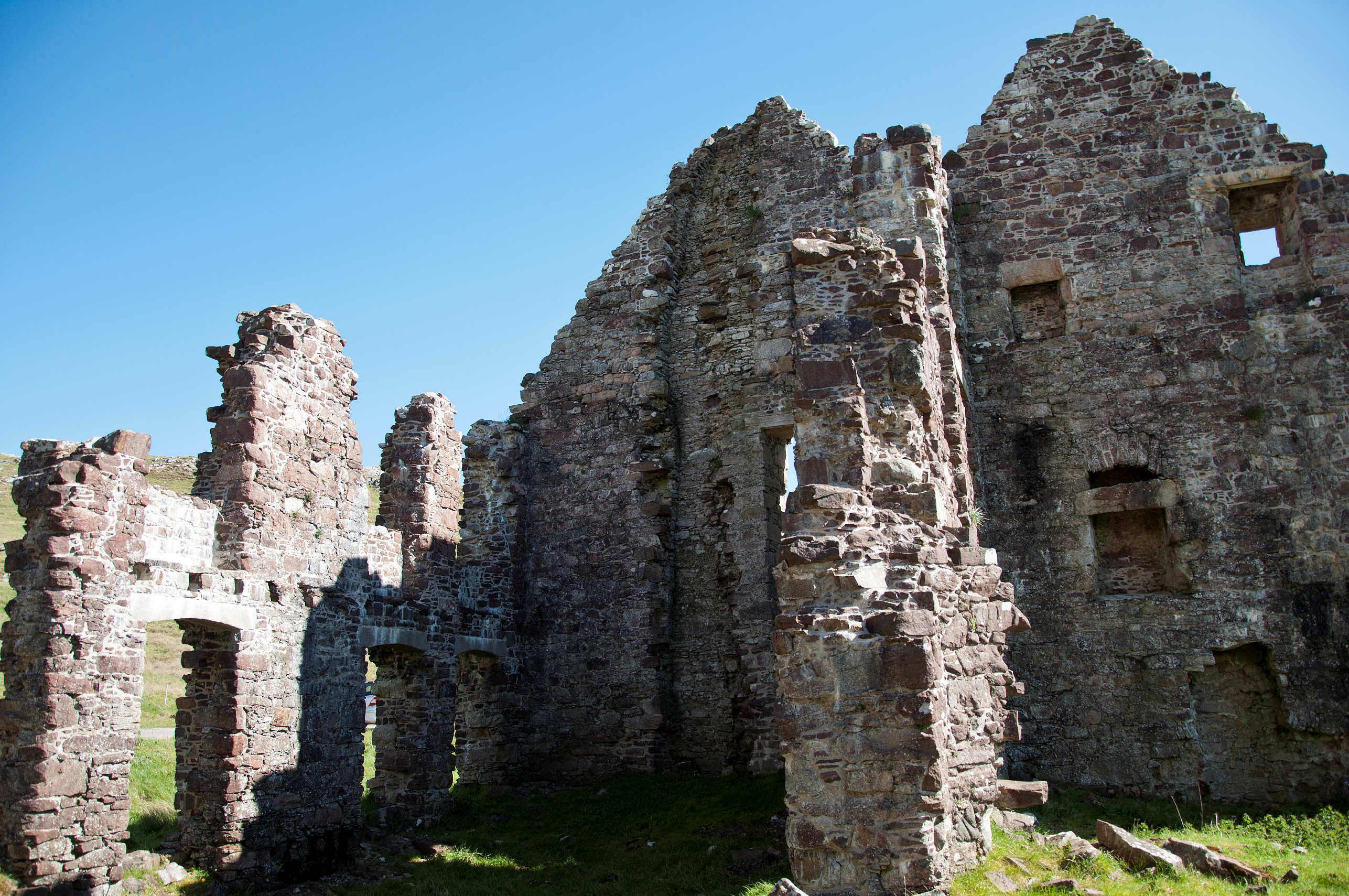 Calda House, Sutherland, Schotland